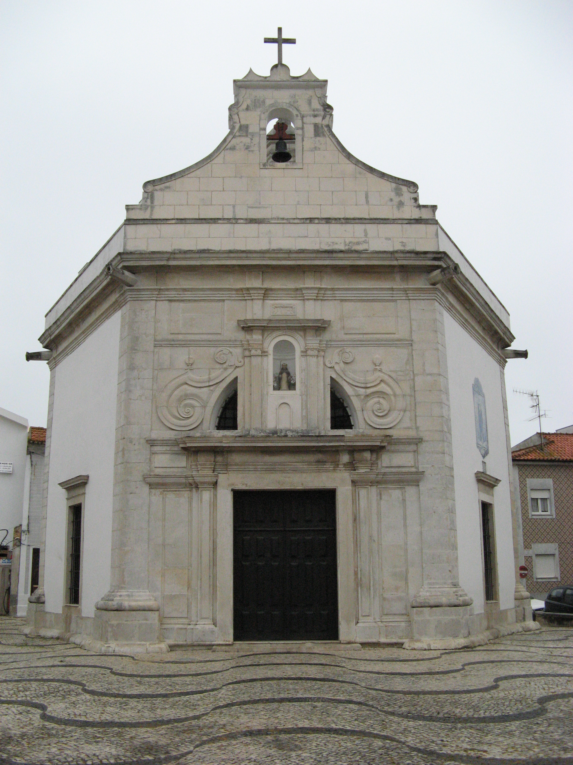 Capela de São Gonçalinho, em Aveiro